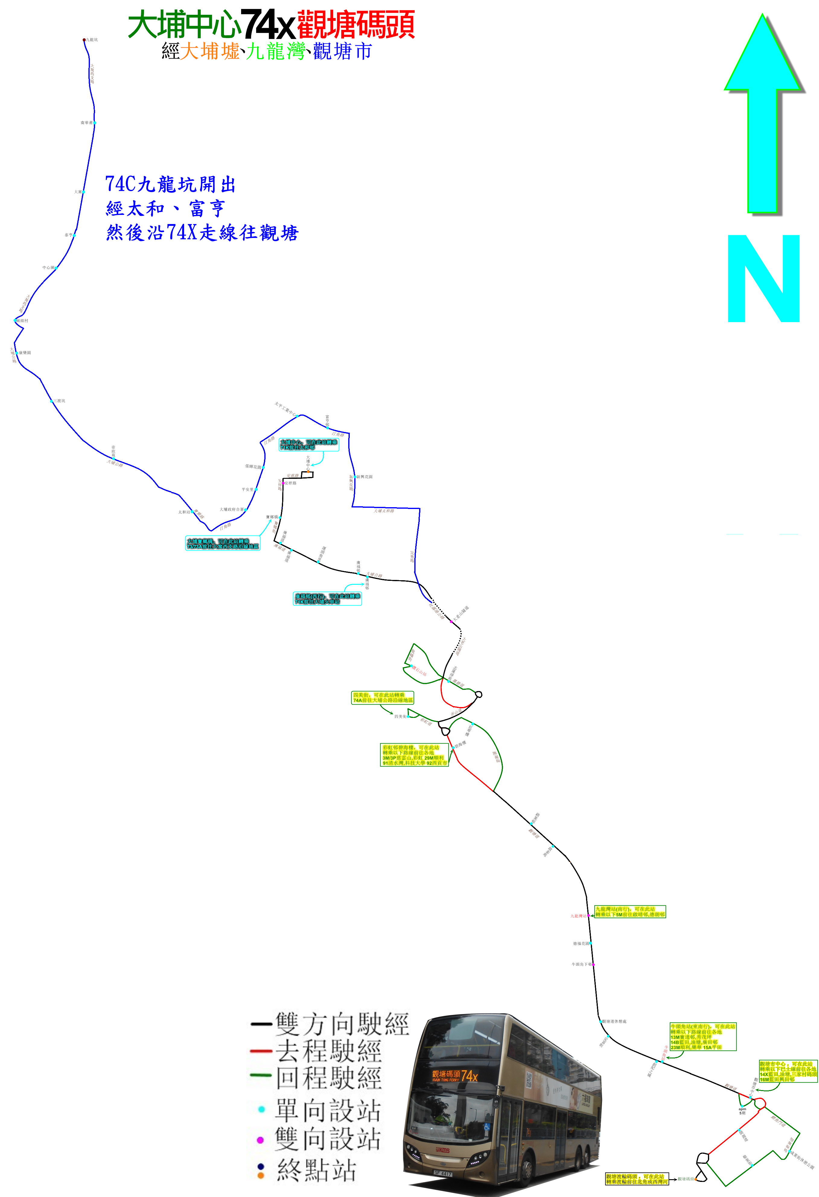 中文（香港）: 九巴74X線的走線圖